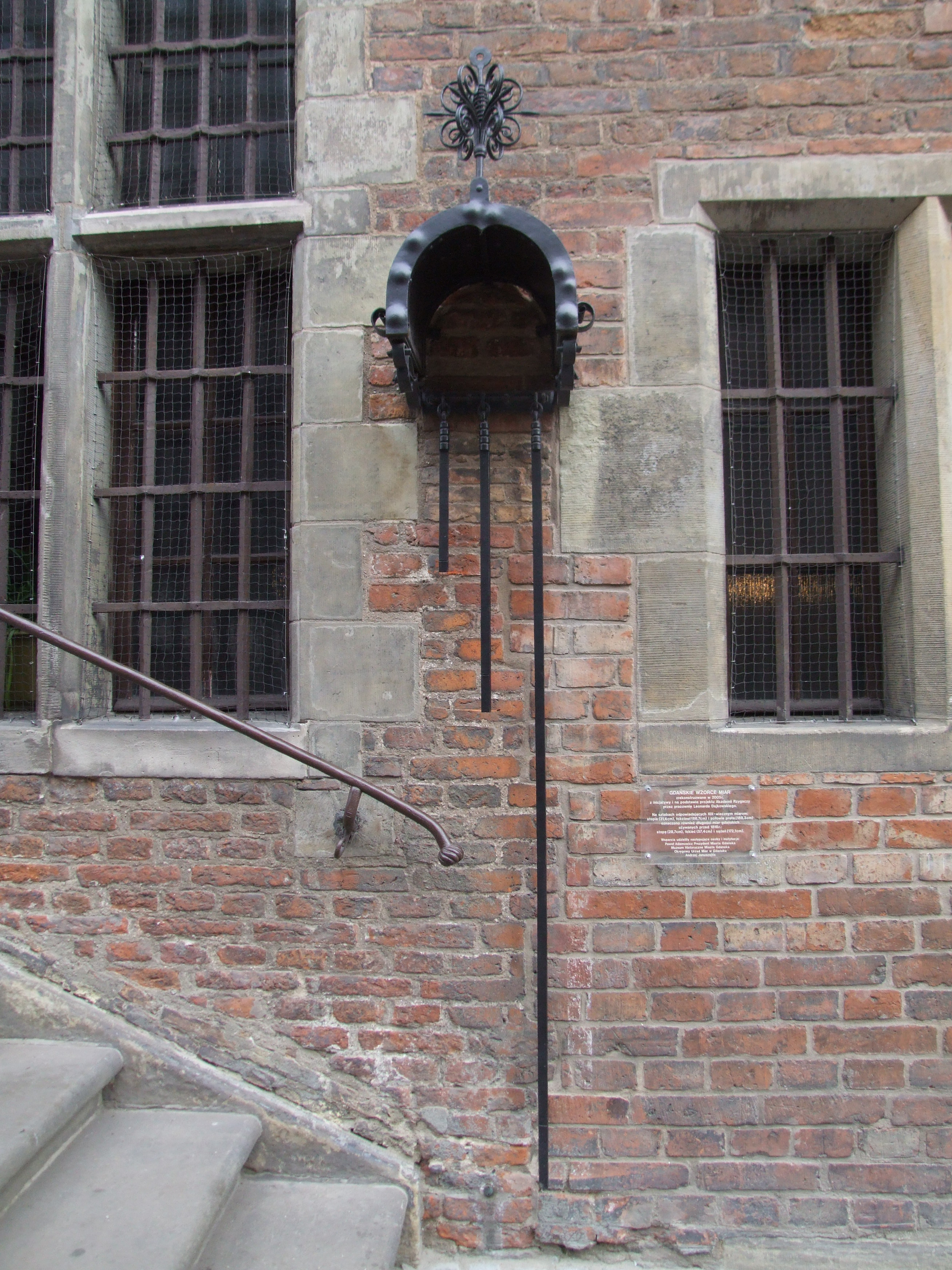 Zrekonstruowane miary gdańskie na Ratuszu Głównego Miasta